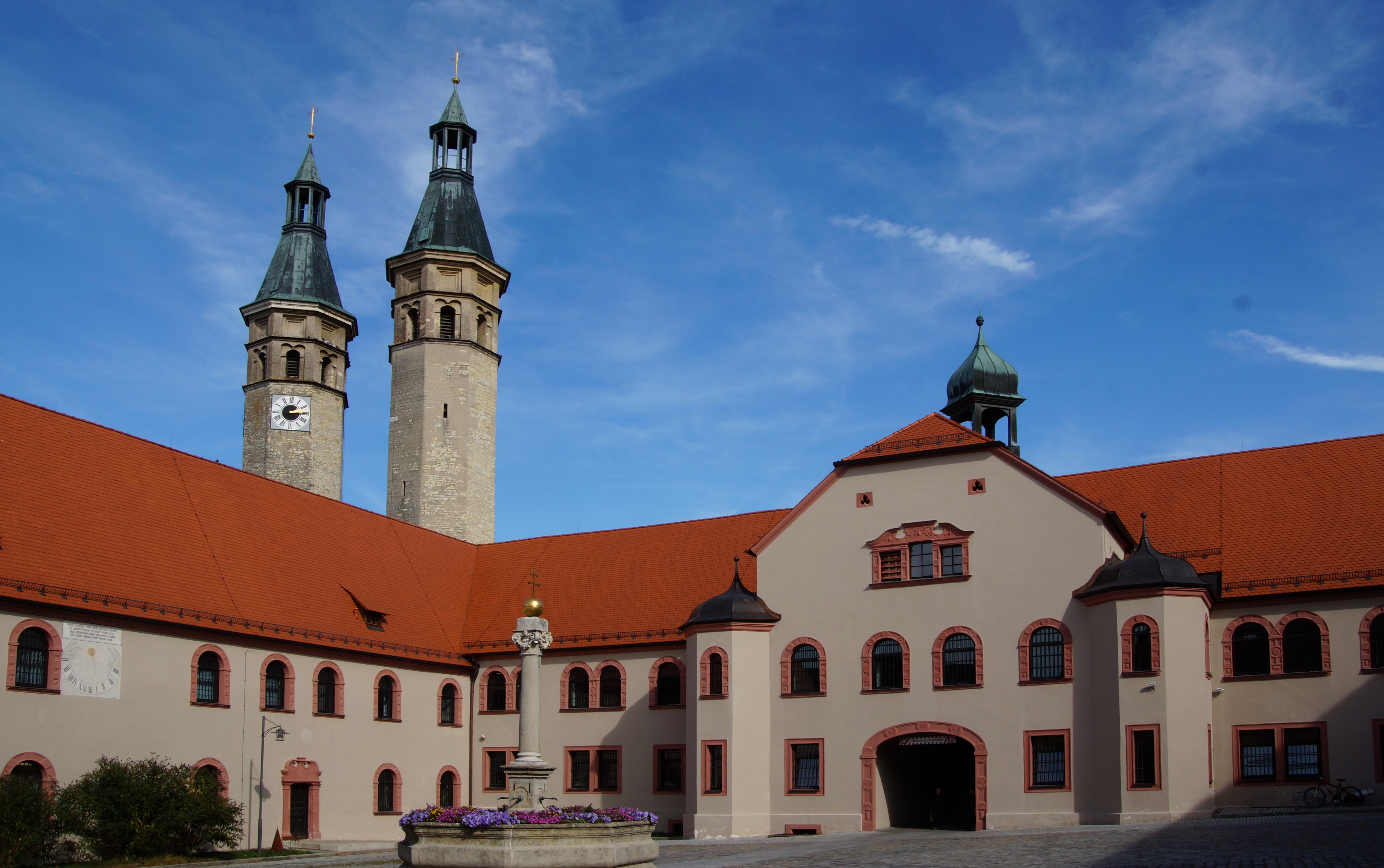 Das ehemalige Karthäuserkloster Prüll in Regensburg